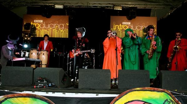 Derwyddon at Latitude 2008